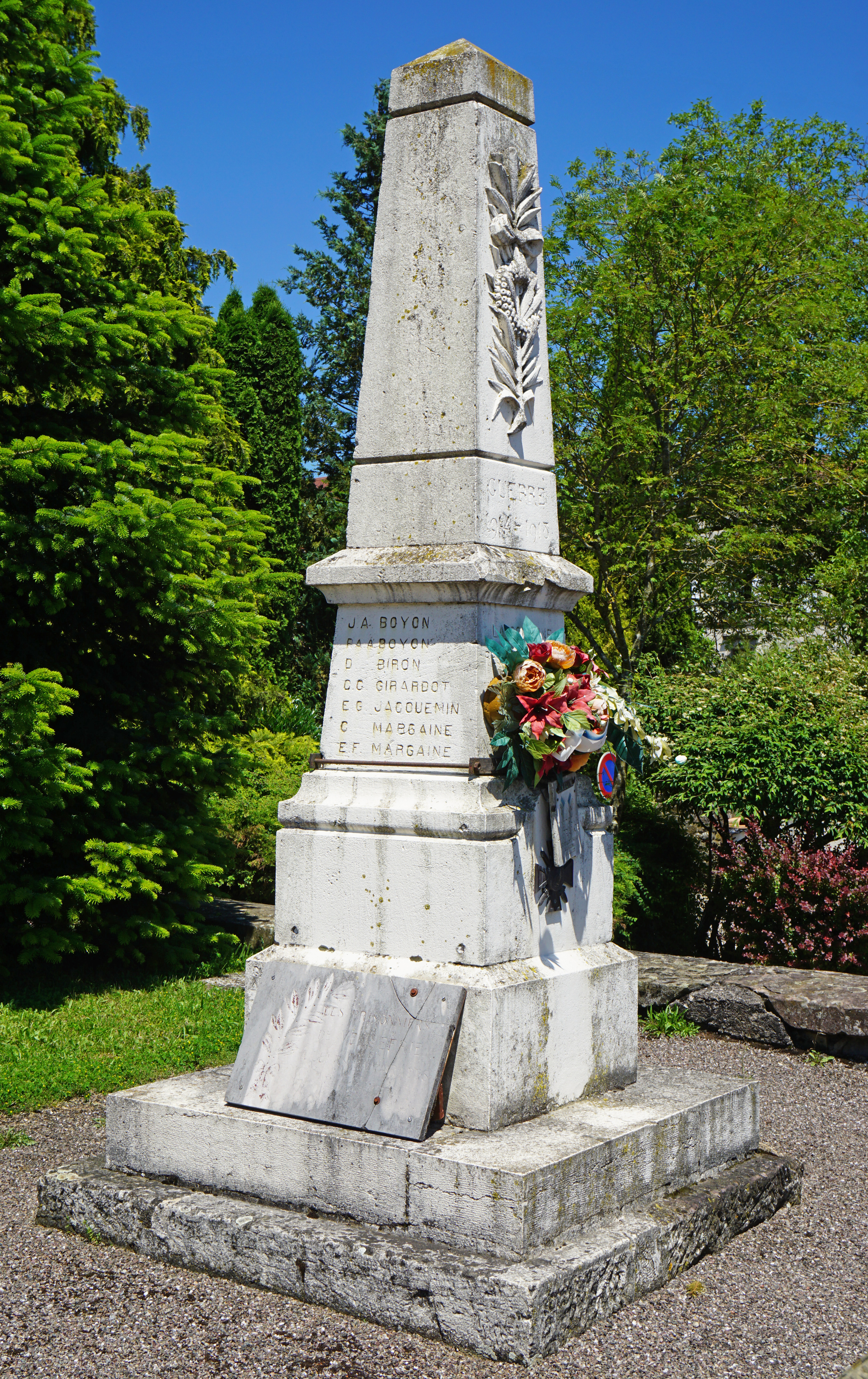 Monument aux morts de Vellefrie.